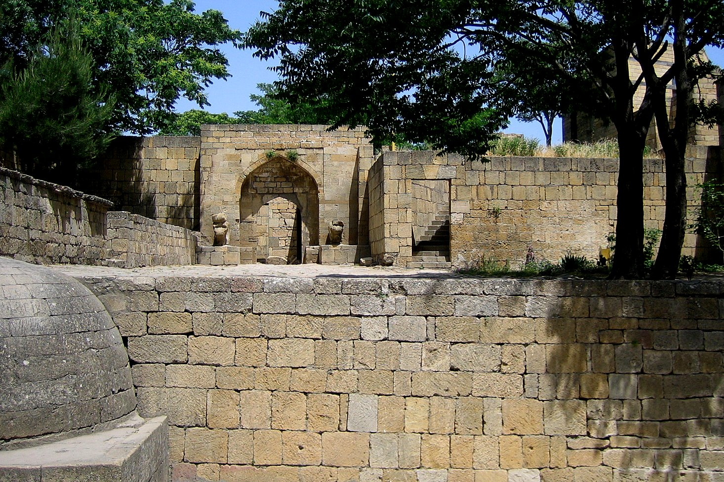 Дербентская цитадель «Нарын-Кала» и древние сооружения внутри цитадели (Республика Дагестан, Дербент, город Дербент)